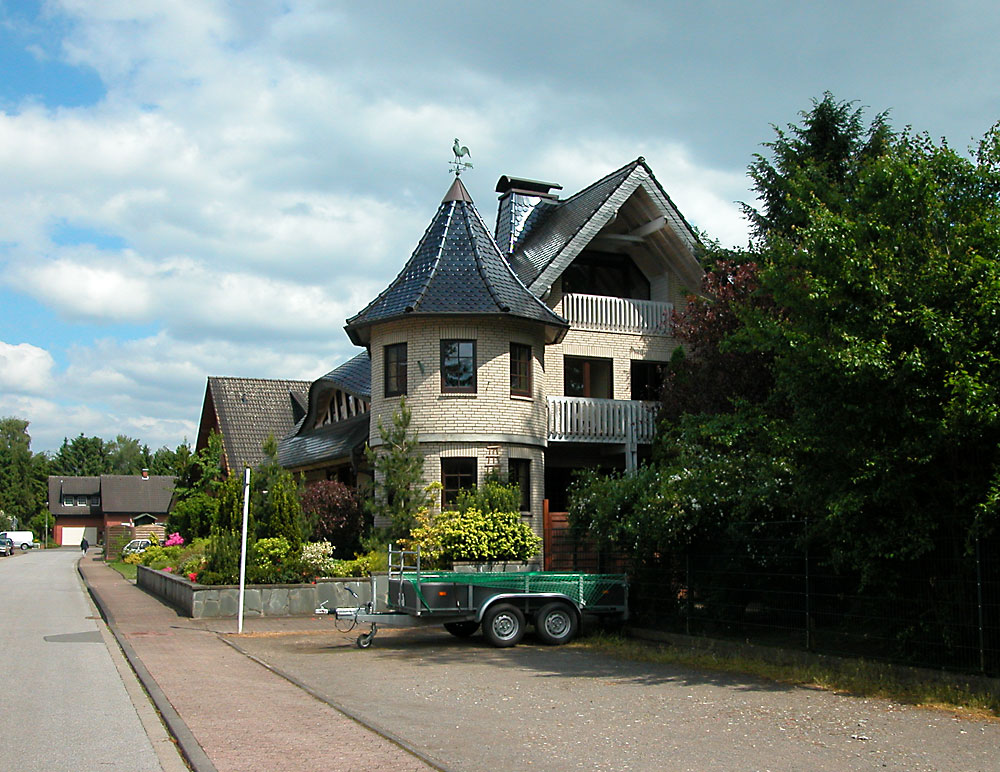 Gebäude in Dorsten-Rhade